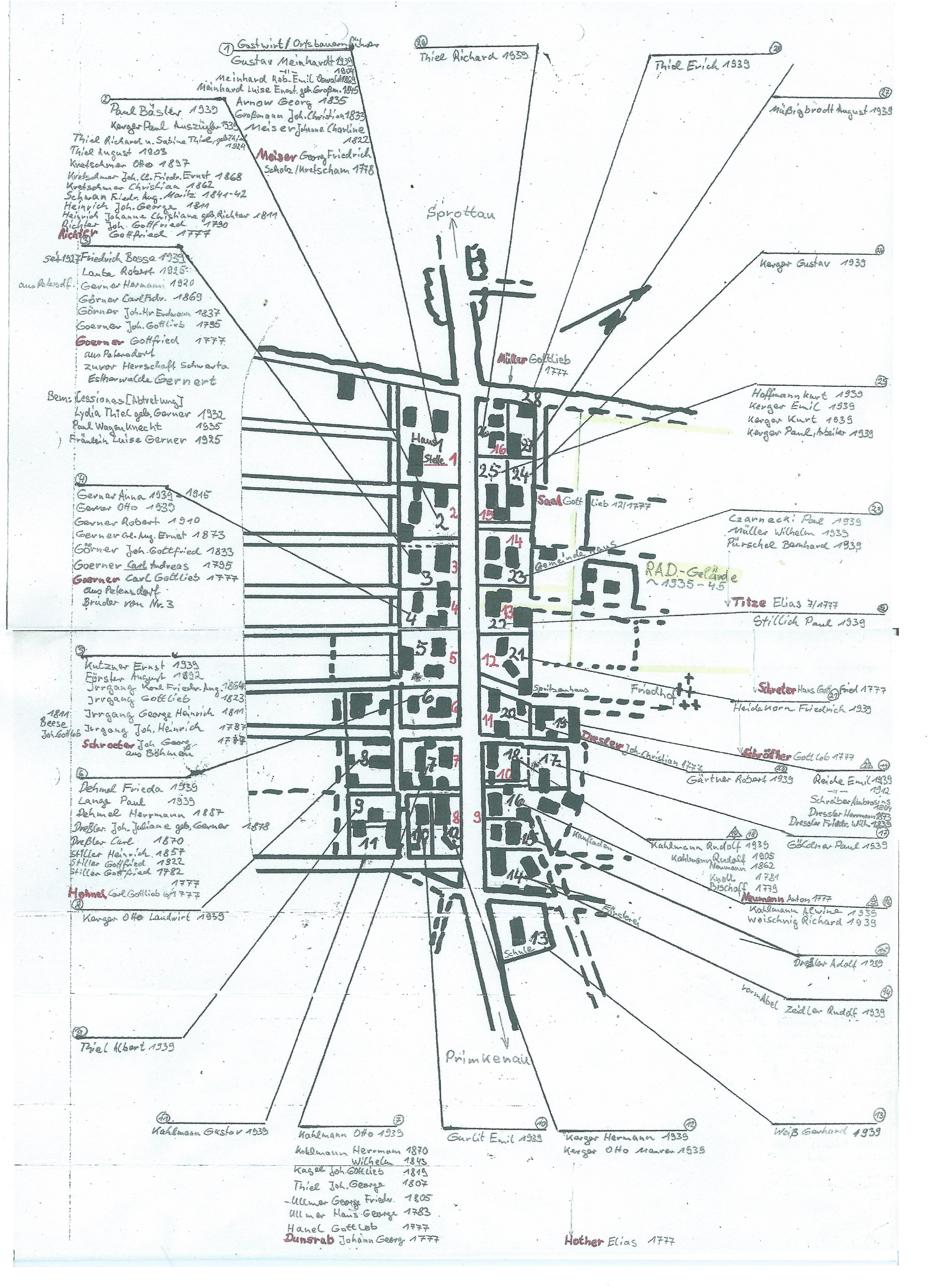 Kolonieeinwohnerplan 1777 bis 1945 nach den Grundbuchern und Qullen des Staatarchiv Grünberg in Polen